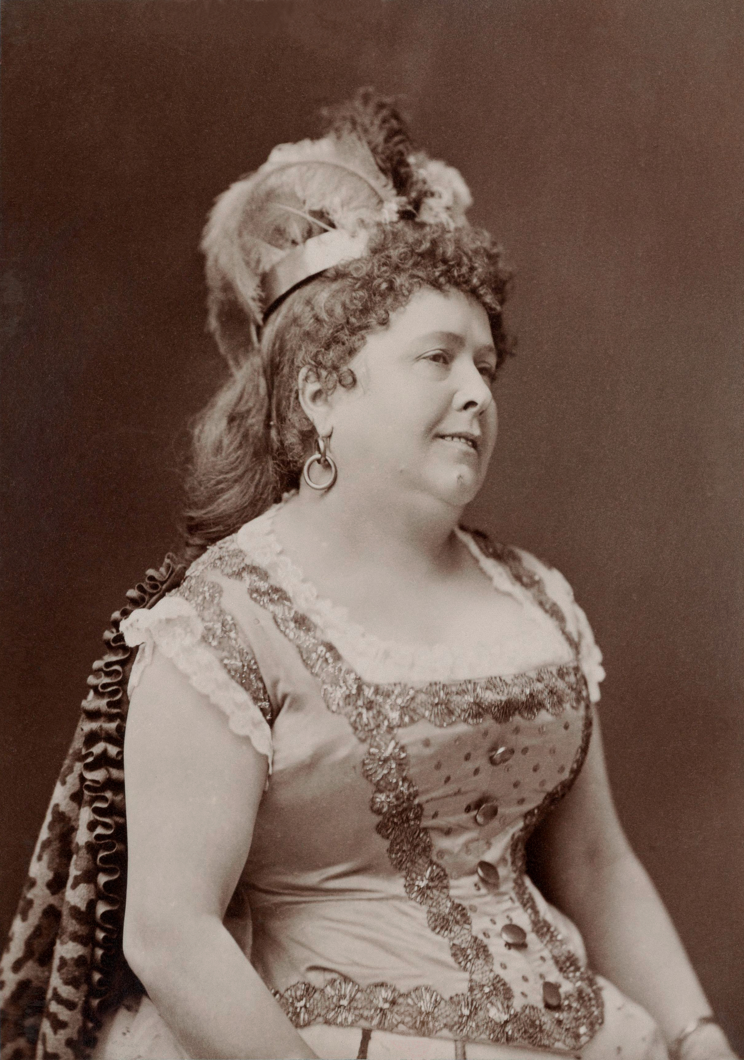 Aline Duval dans La Princesse de Trébizonde au théâtre des Variétés (1875), cliché Nadar.